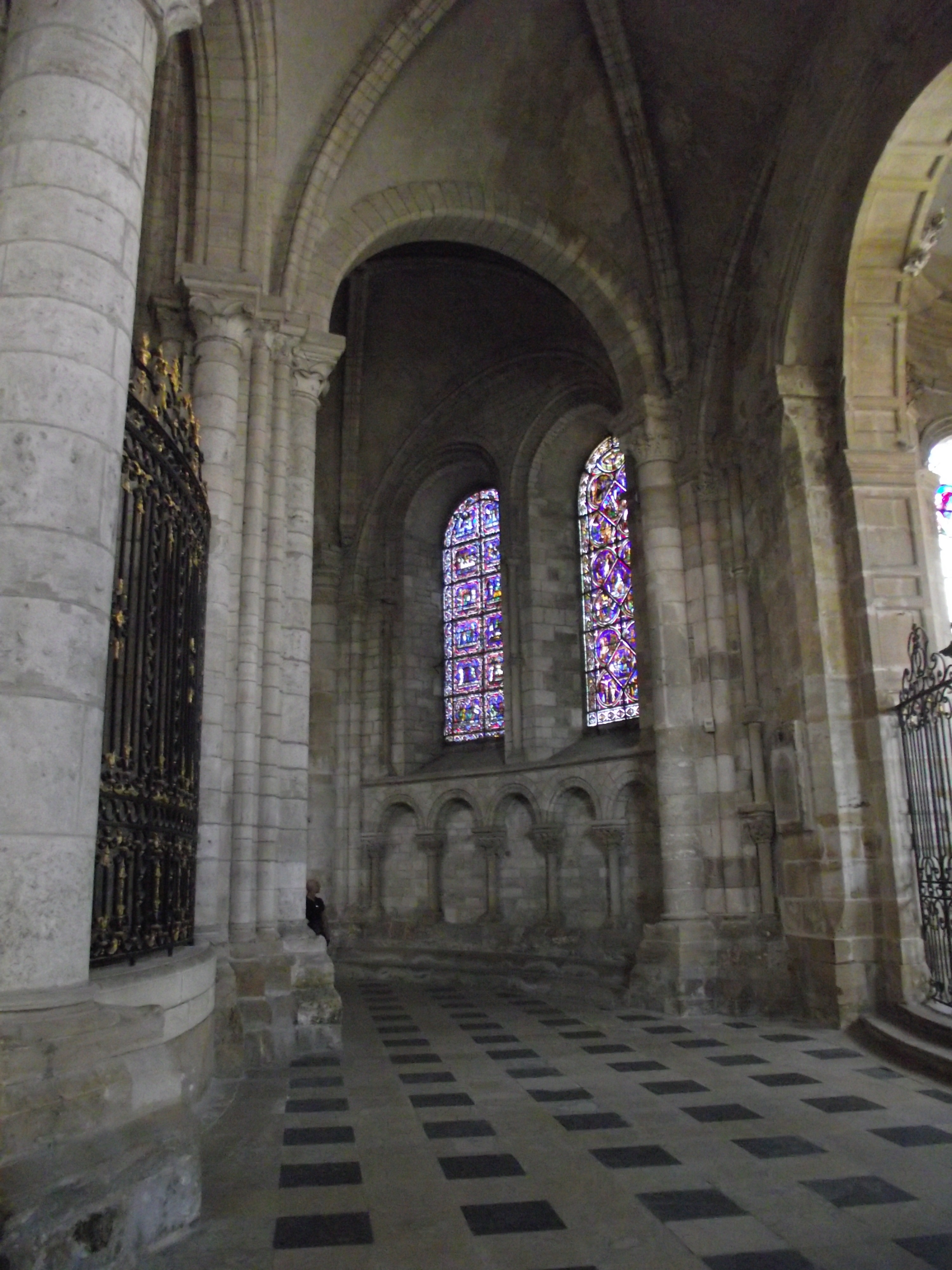 Sens, Cattedrale di Santo Stefano